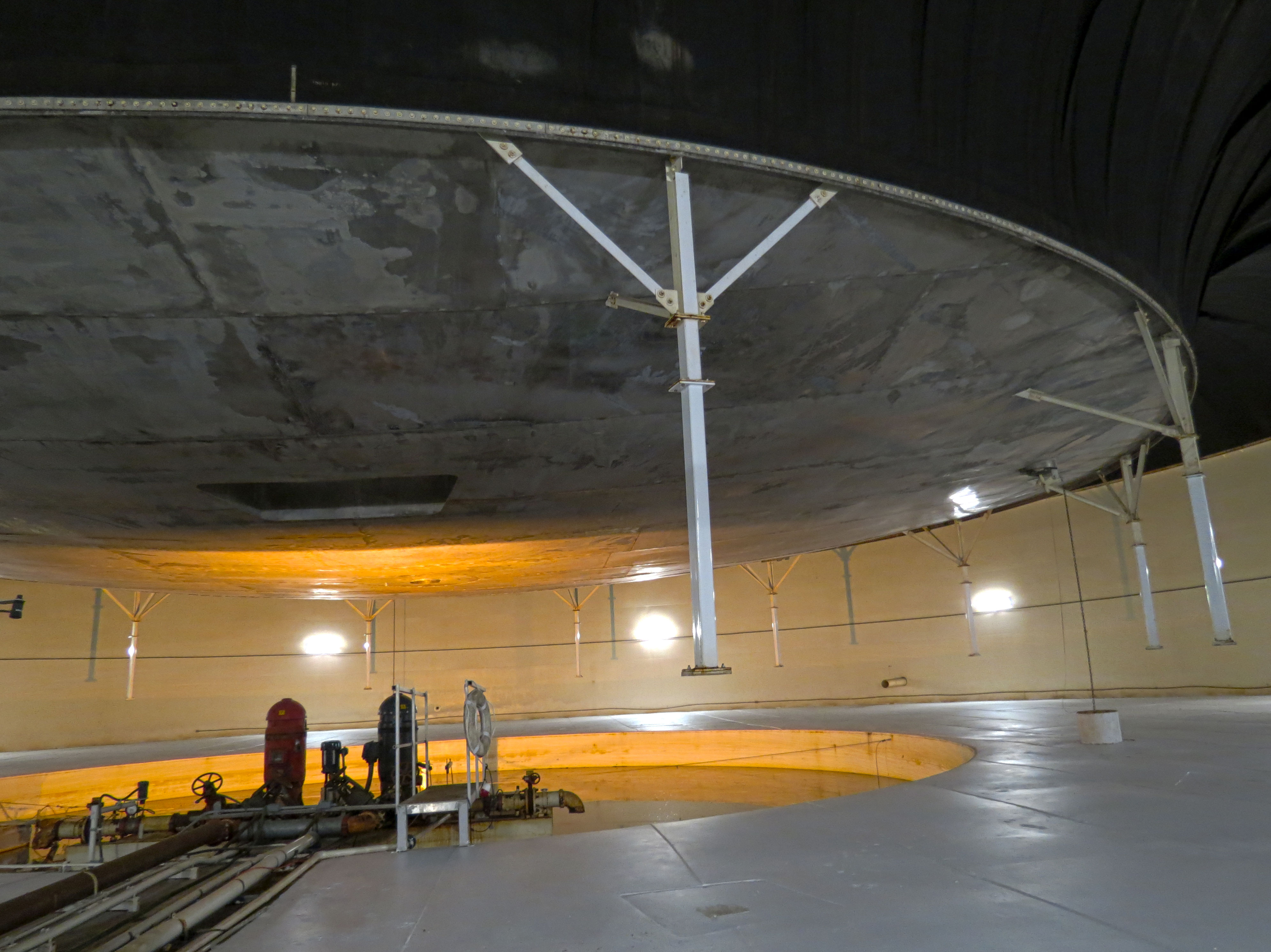 Biosphere 2, Oracle, Arizona, USA.